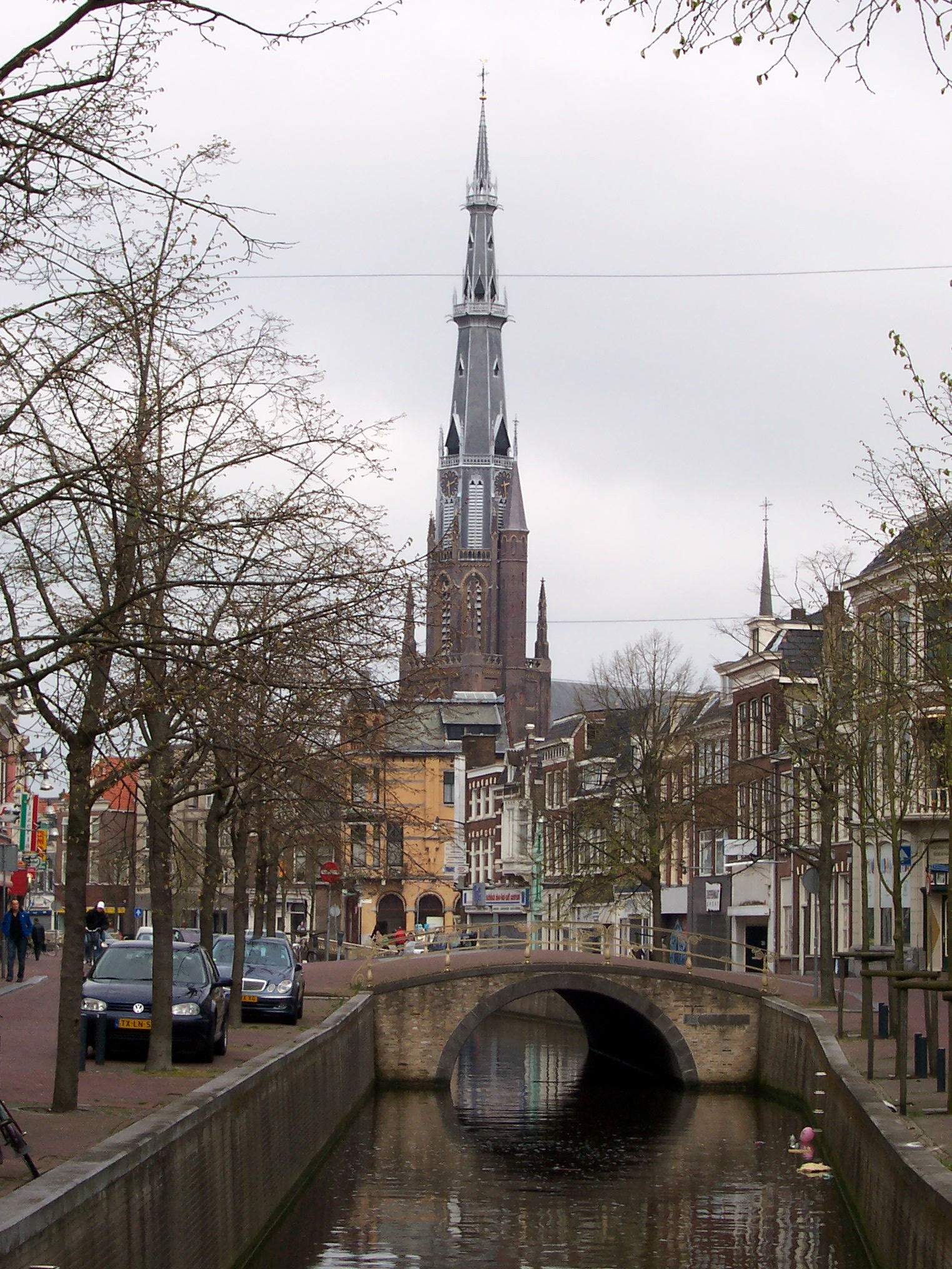 Leeuwarden: Voorstreek mit dem BonifatiusturmFrysk: Ljouwert: Foarstreek mei Bonifatiustoer